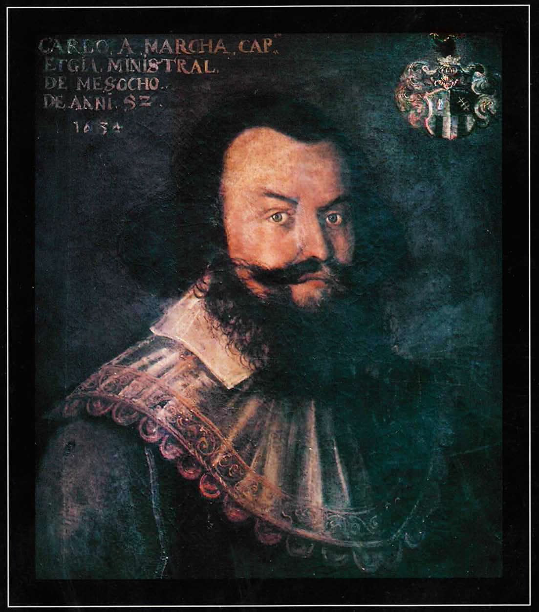 Porträt 1634 von Carlo a Marca (1583-1640)